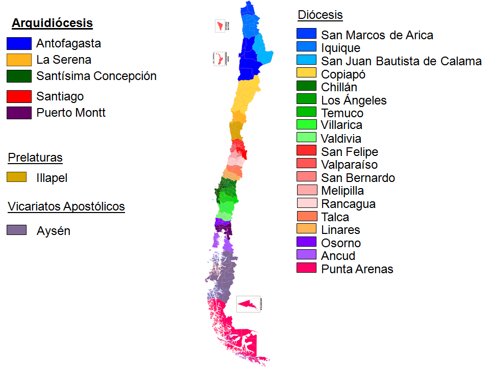 Mapa de las Jurisdicciones de la Iglesia Católica en Chile. Las diócesis sufragáneas van en tonos mas claros del mismo color que su Arquidiócesis. Inspirados en mapas similares de Venezuela, Colombia, España y Portugal.